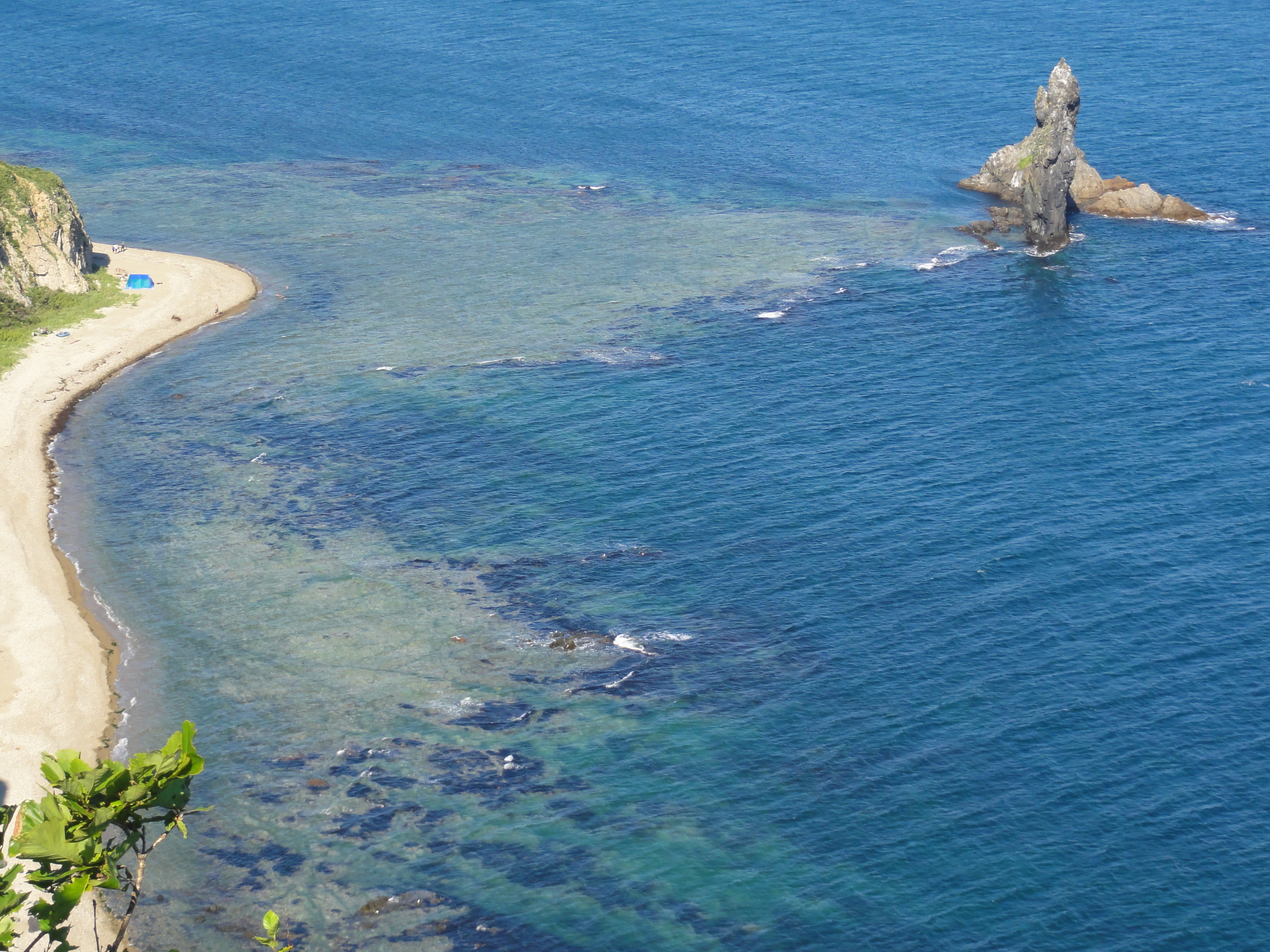 Скалистая подводная отмель между берегом и кекурами Два Брата